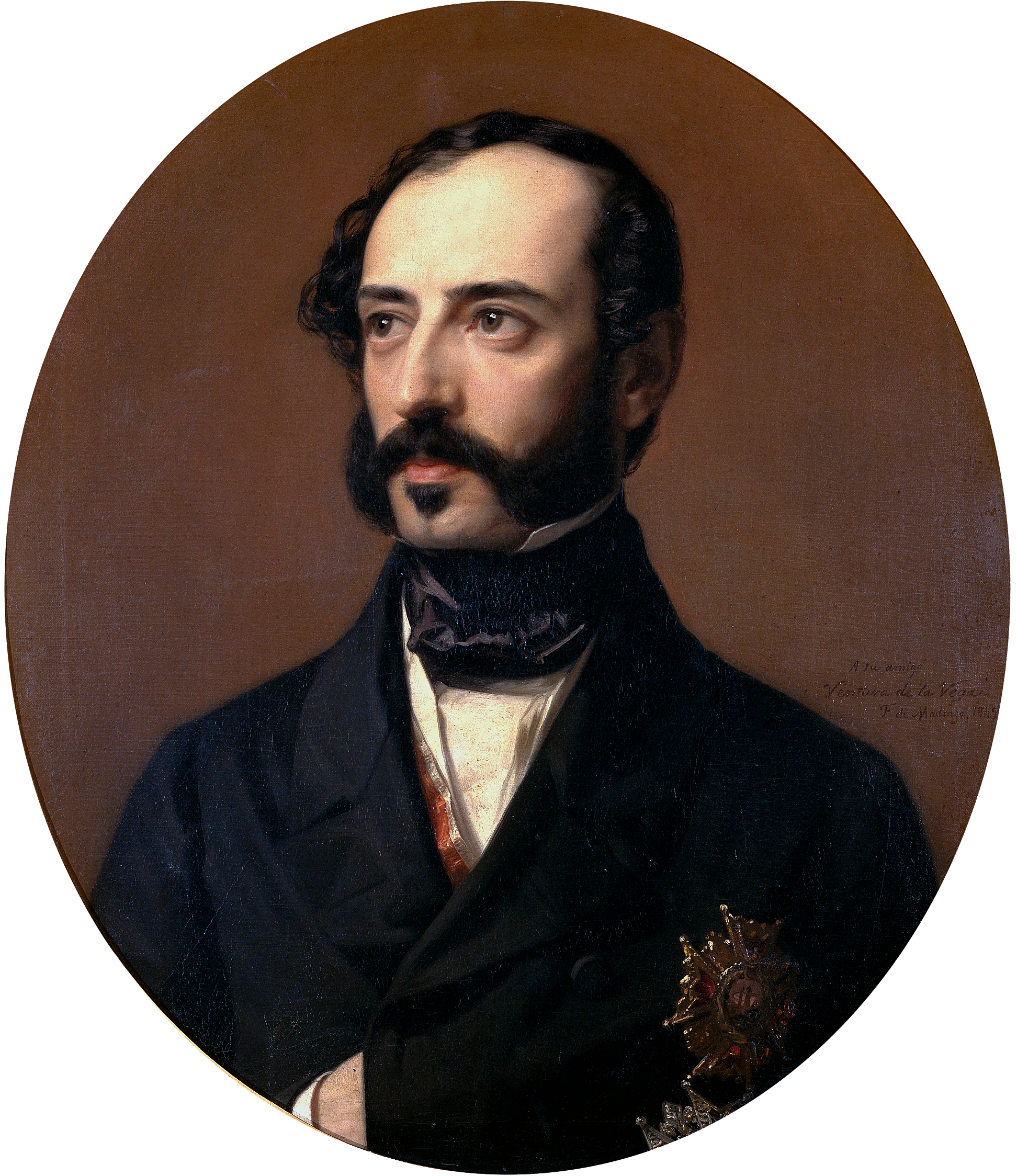 Retrato del escritor español Ventura de la Vega (1807-1865).